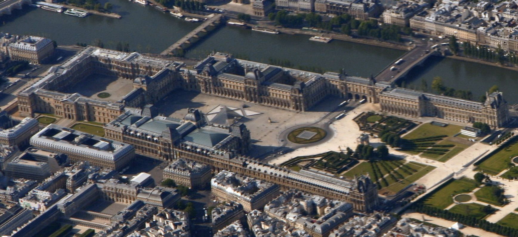 Aerial photograph of Palais du Louvre in Paris